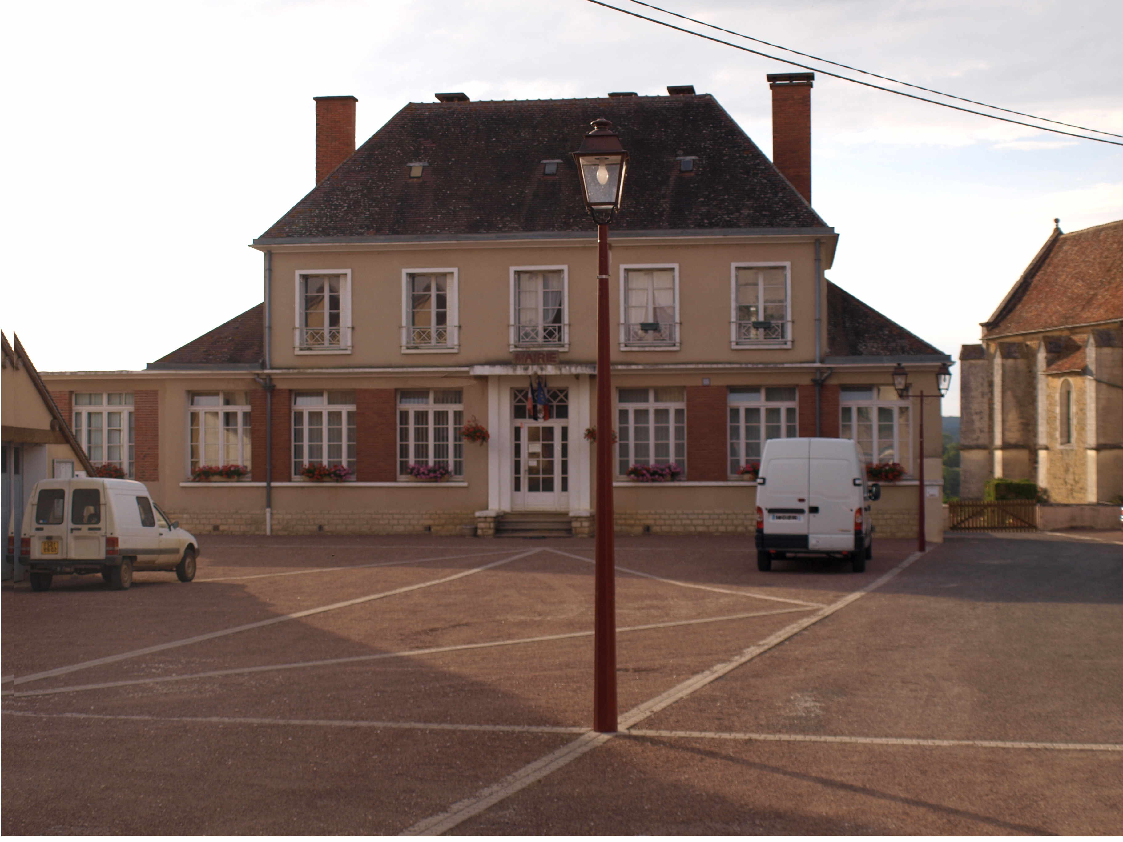 Lalande (Yonne) - la mairie